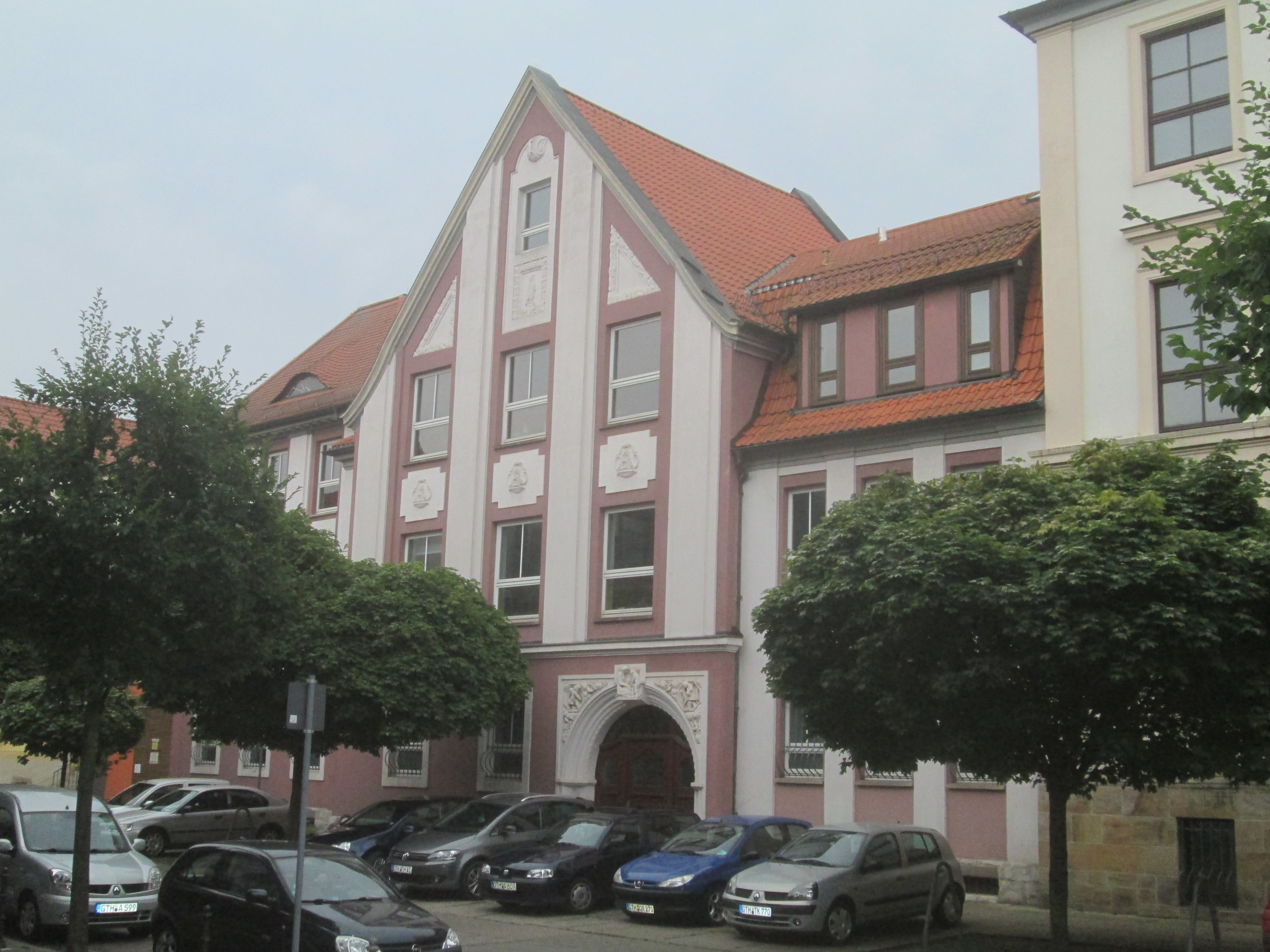 Myconius-Schule Gotha, Erweiterung